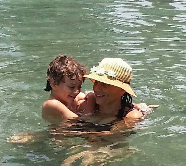 נעמה מישר עם בנה שני